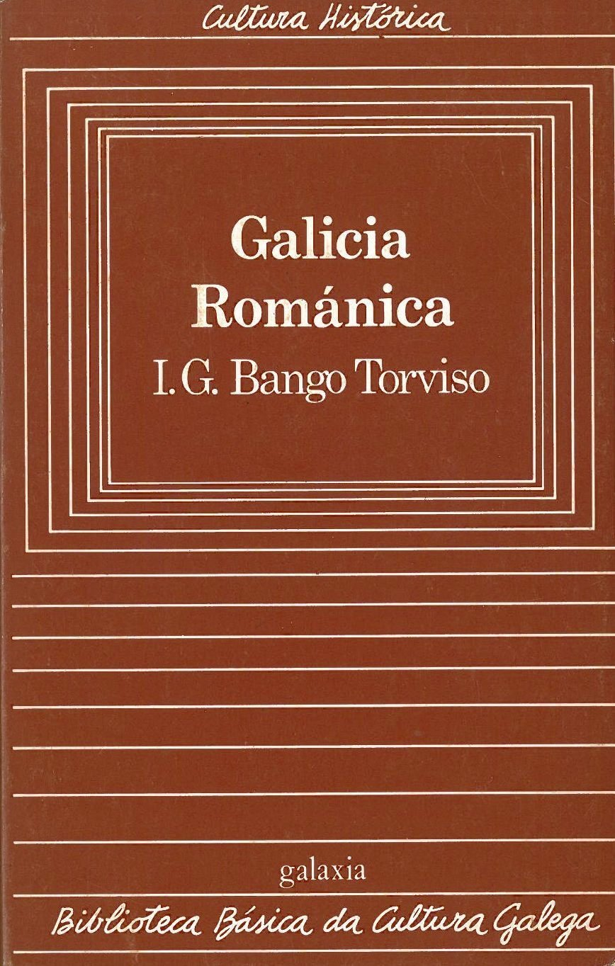 Biblioteca Básica da Cultura Galega, 08, Galicia Románica, I. G. Bango Torviso.jpg